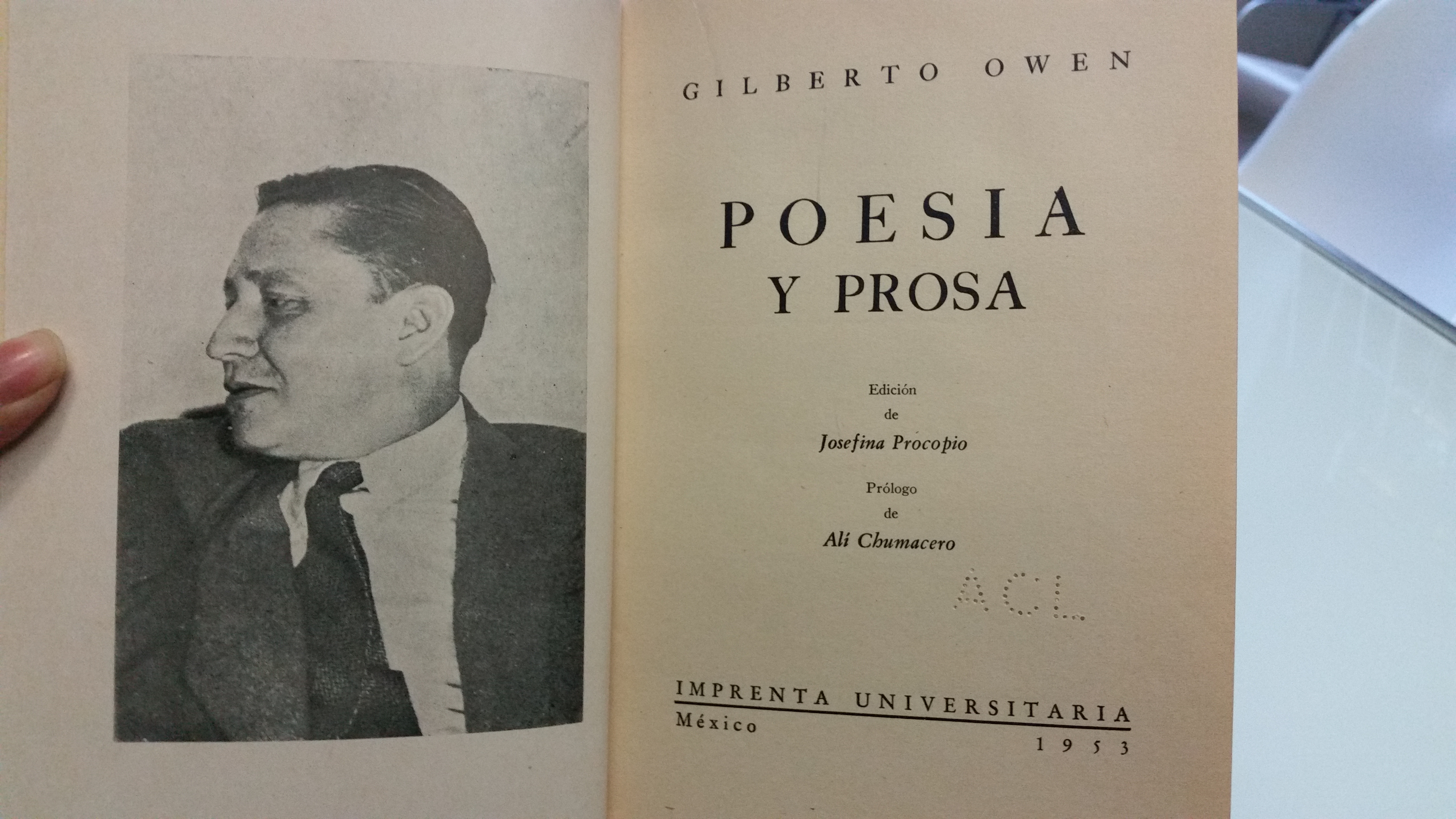 Primera edición "Poesía y Prosa" recopilación de obras de Gilberto Owen. Imprenta Unversitaria, 1953.